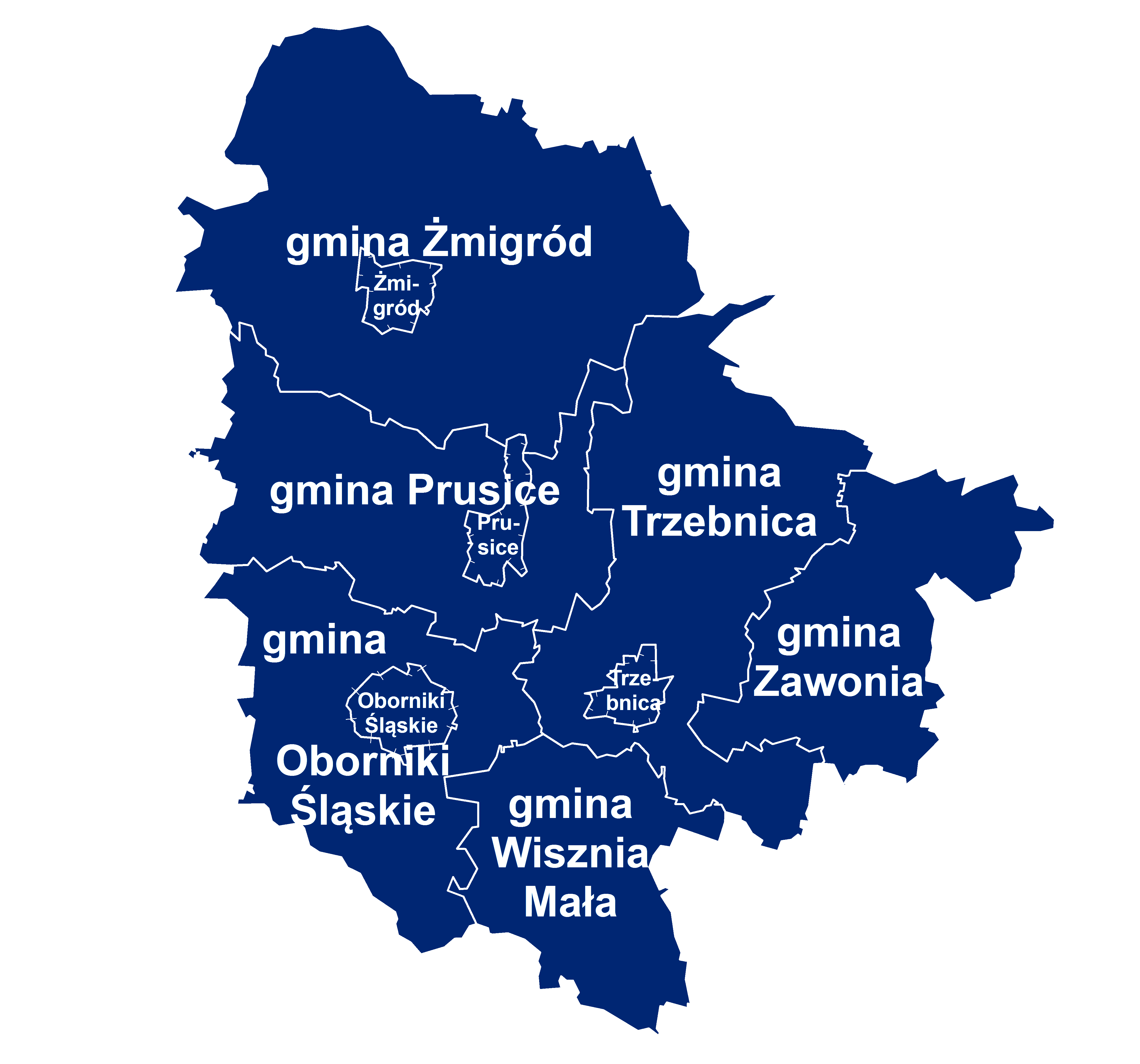 Kontury powiatu trzebnickiego z zaznaczeniem granic gmin i miast + opis